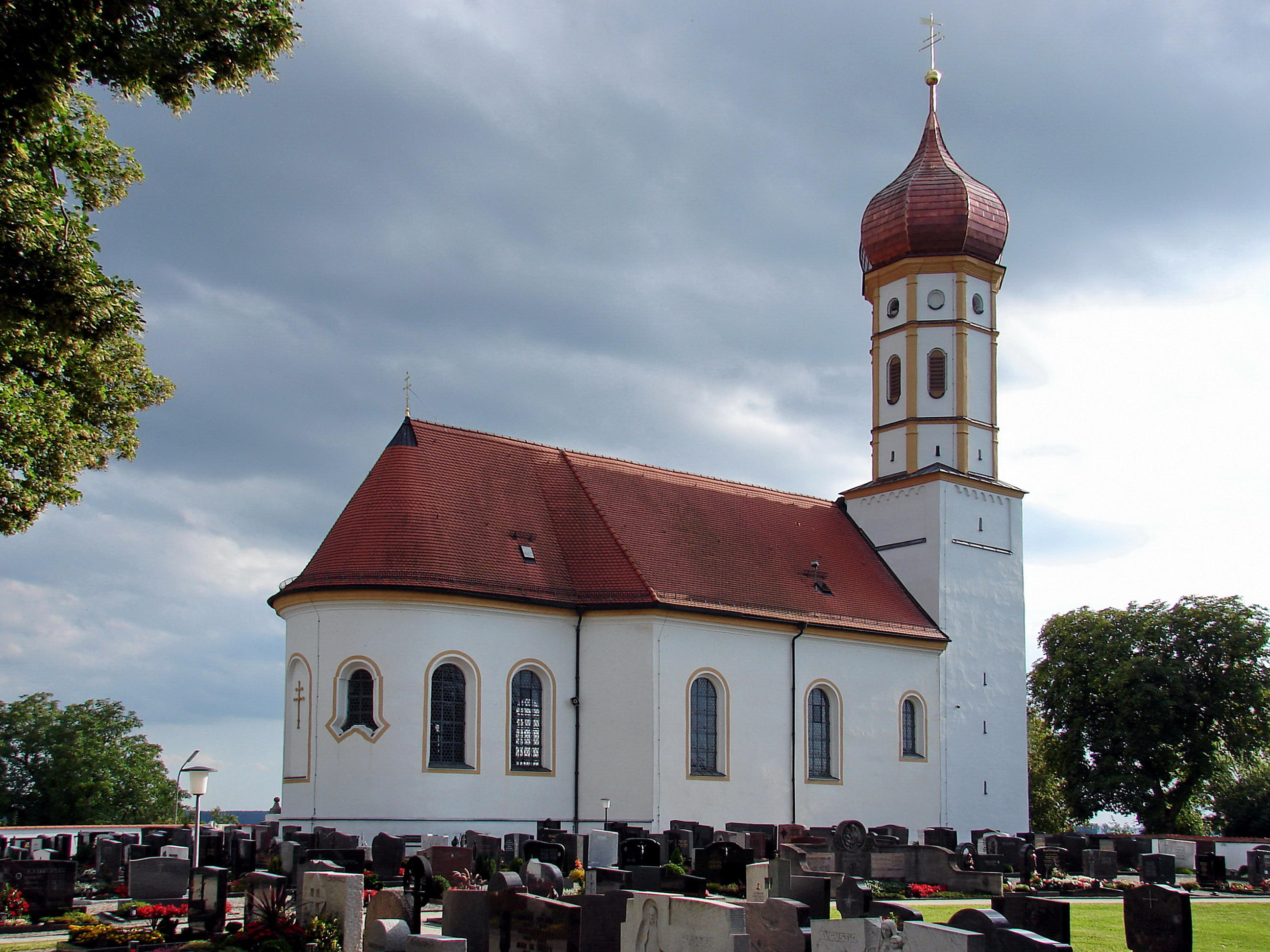 Kath. Pfarrkirche Mariae Heimsuchung, barocke Saalkirche, erbaut 1767, Turmunterbau romanisch; mit Ausstattung; Friedhofsmauer; mit Strebepfeilern (westliche Hälfte), wohl 17. Jh.